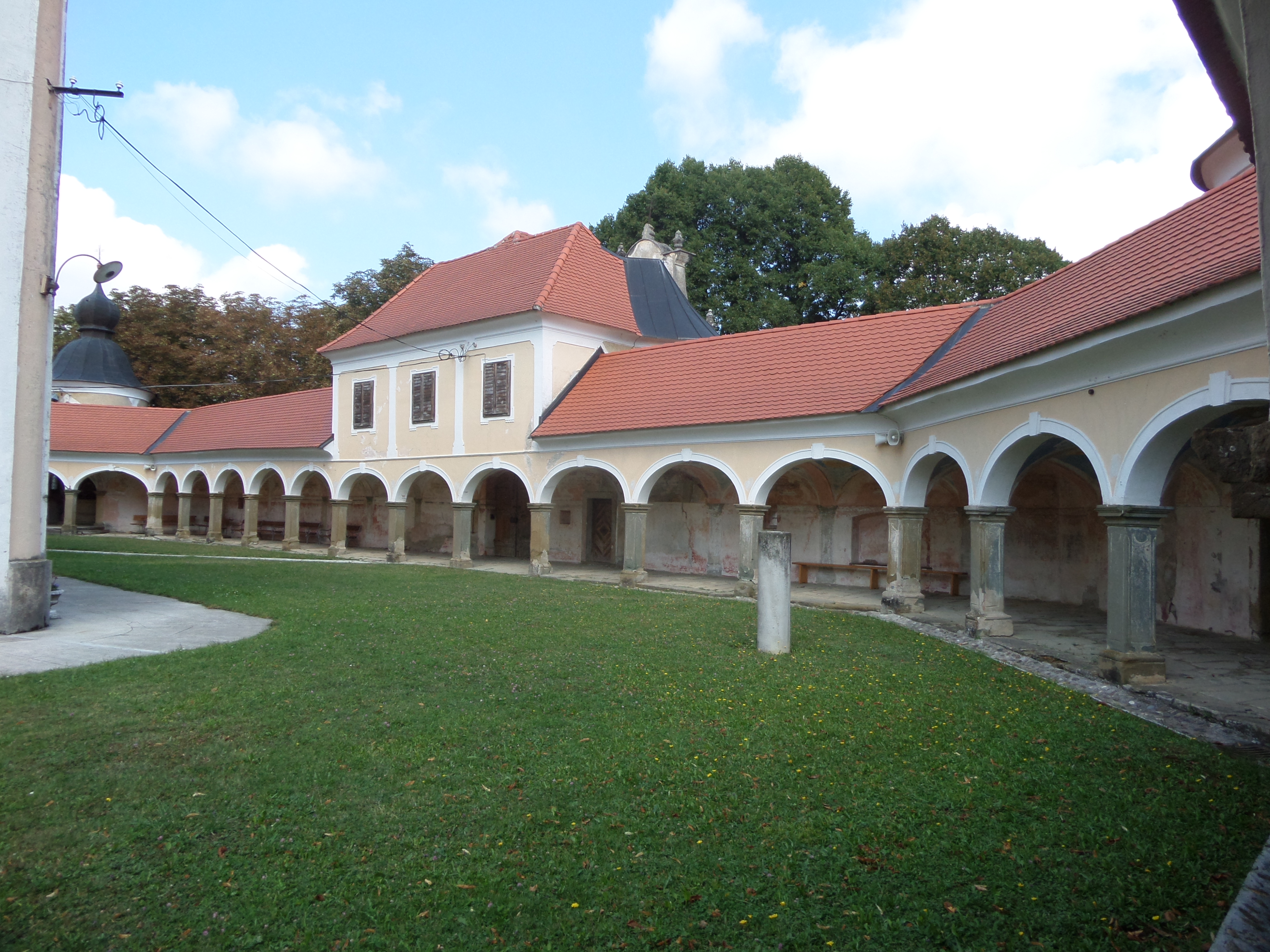 16.08.2016. - Krapina ,Trški Vrh, Kroatien